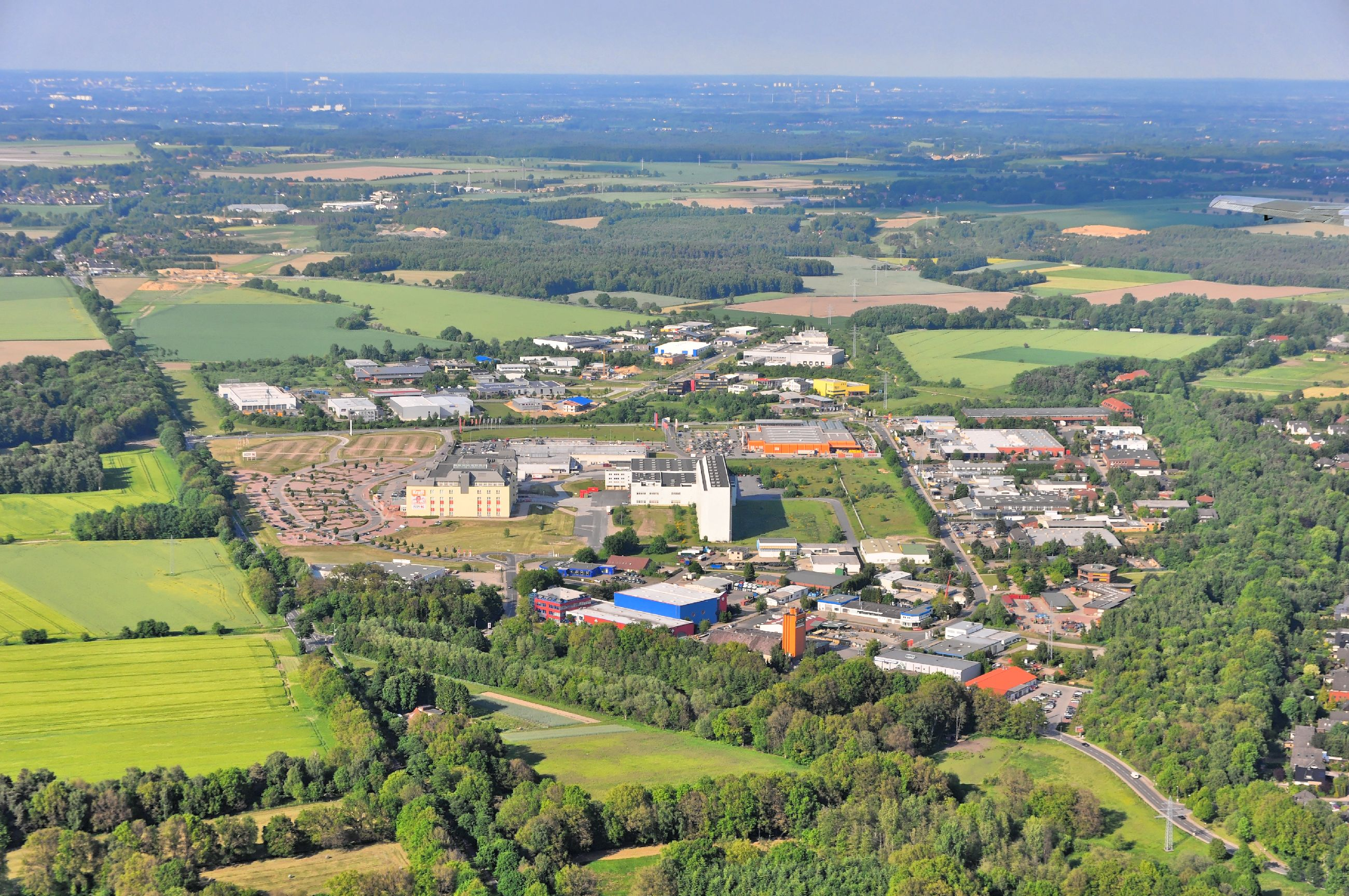 Überführungsflug vom Flugplatz Nordholz-Spieka über Lüneburg, Potsdam zum Flugplatz Schwarzheide-Schipkau